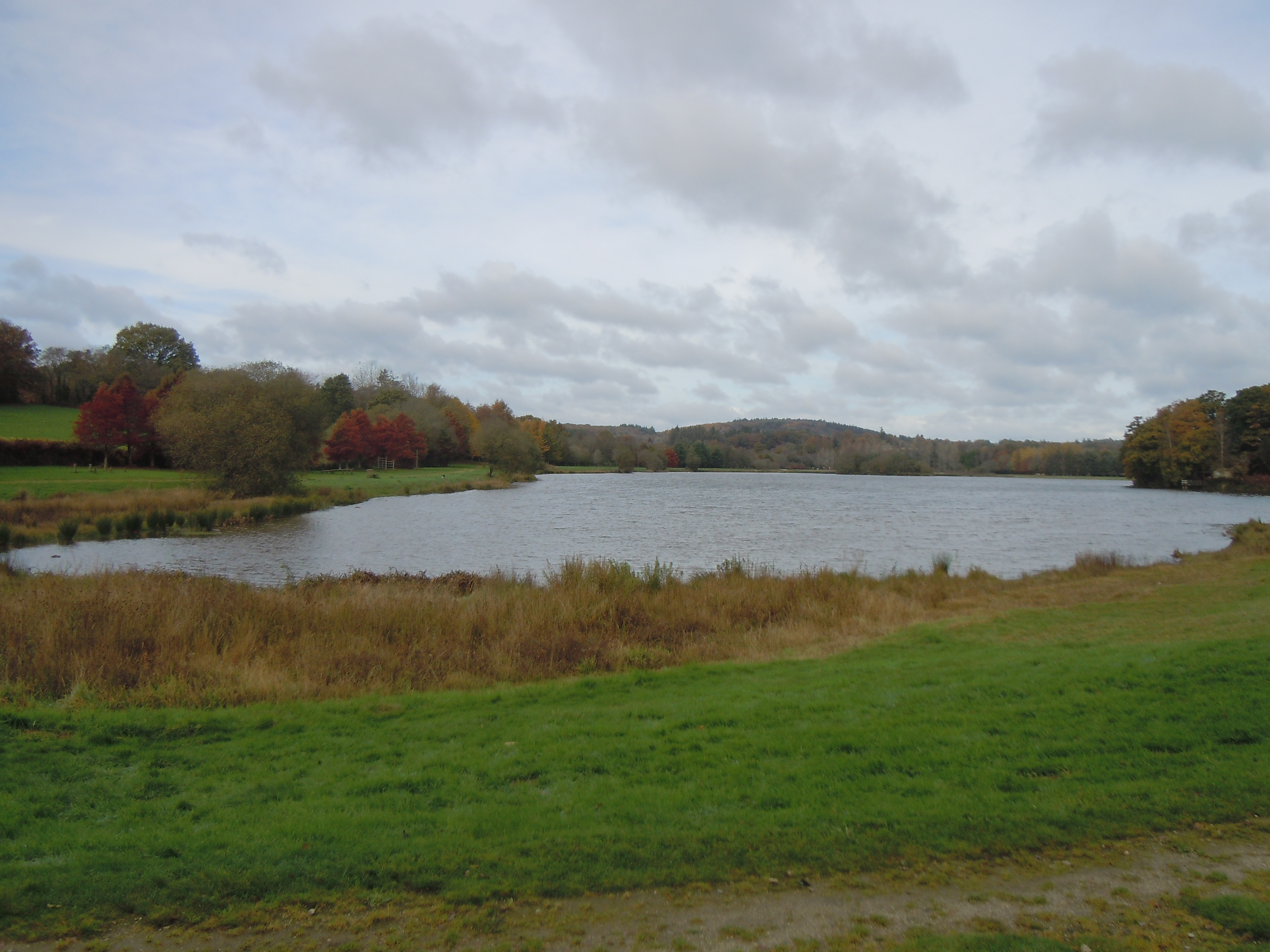 L'étang du Dordu à Langoëlan, dans le département du Morbihan